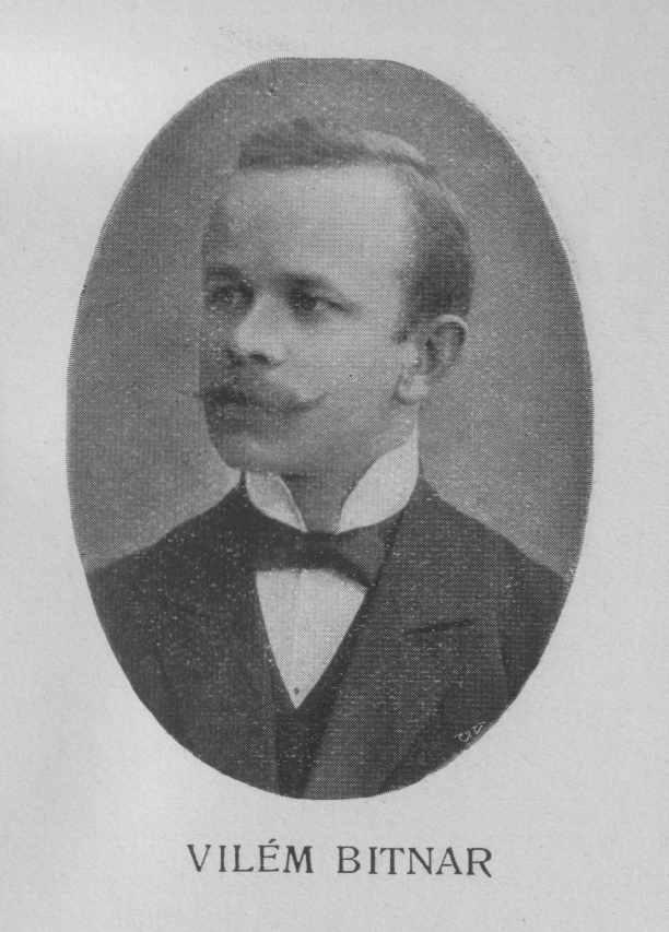 Vilém Bitnar (1874 - 1948), Český literární a kulturní historik, spisovatel.